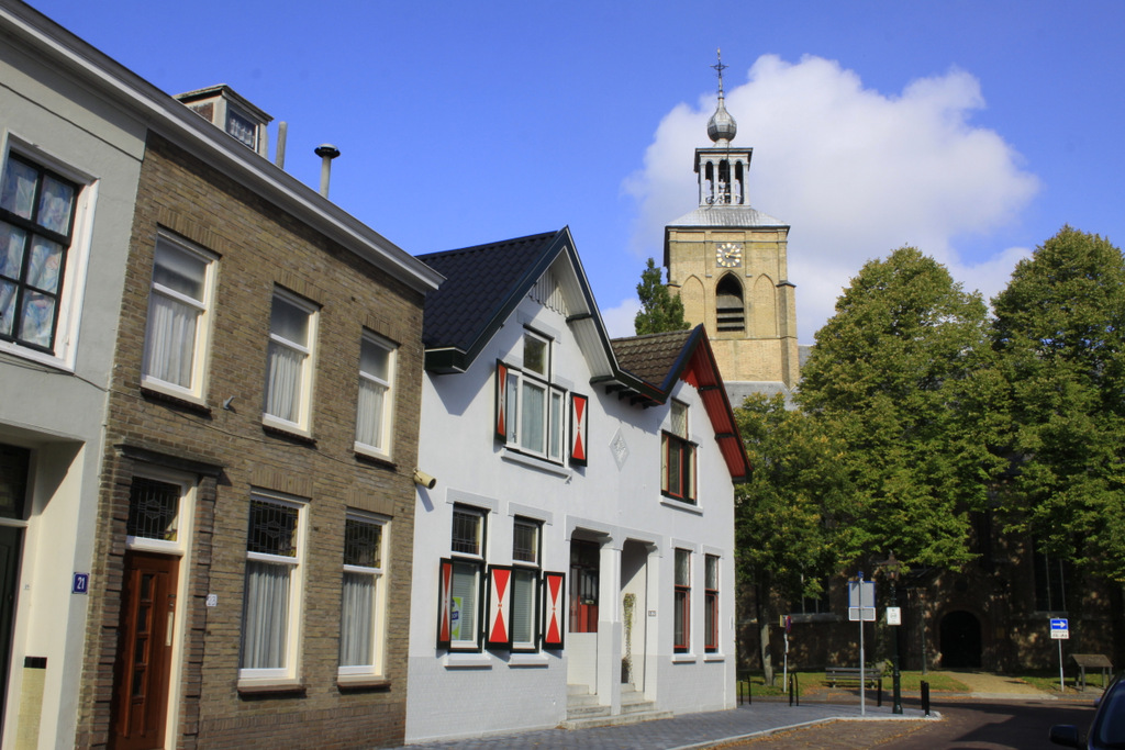 De Voorstraat in Oude-Tonge met de toren van de Hervormde kerk.